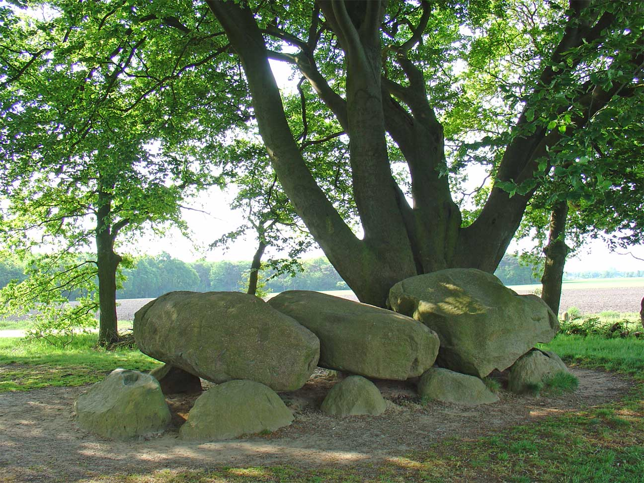 Hunebed D21 nabij Bronneger